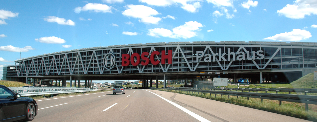 Parkhausbrücke am Flughafen Stuttgart